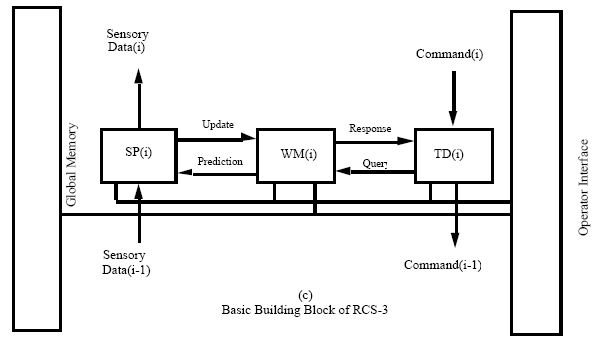 RCS-3 control paradigm